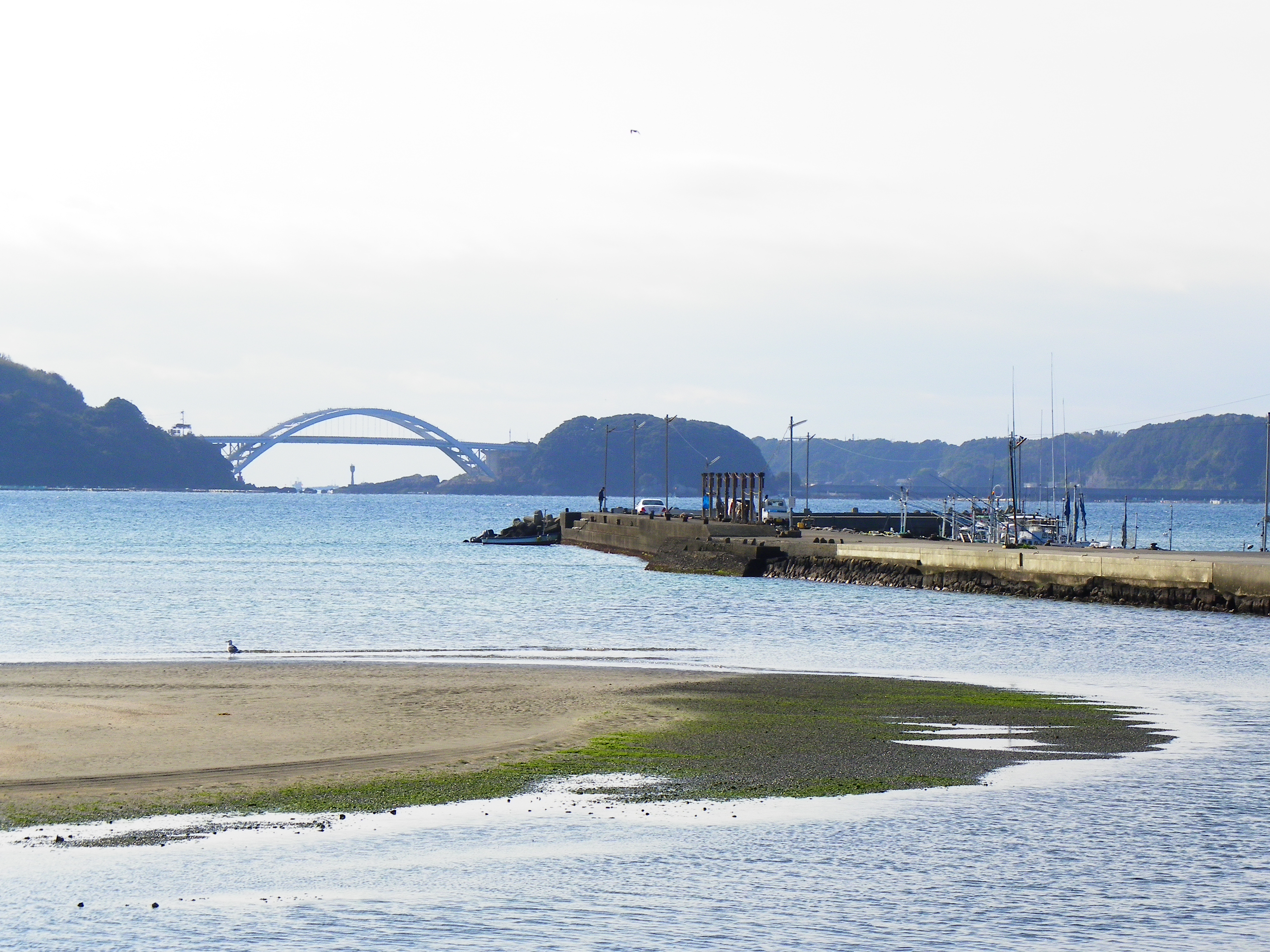 橋杭岩から望むくしもと大橋と苗我島。